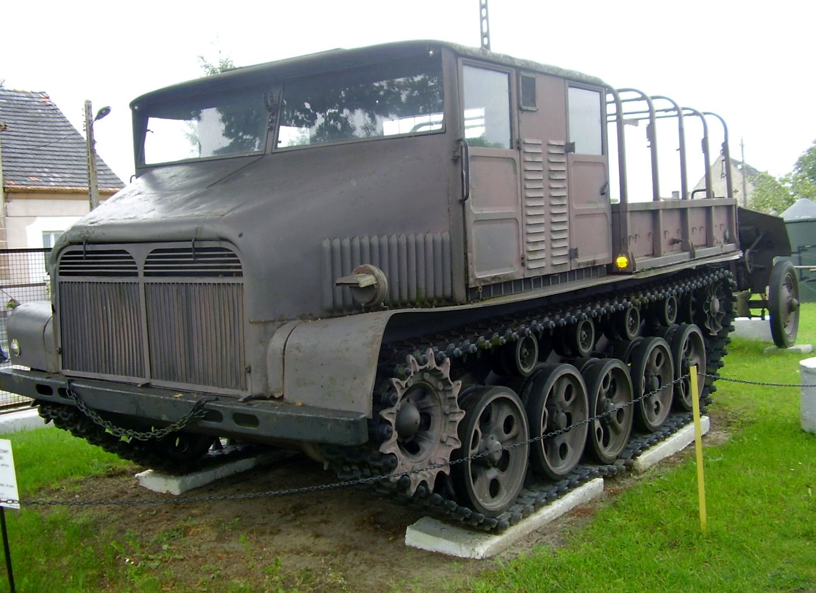 Ciągnik gąsienicowy MAZUR D-350